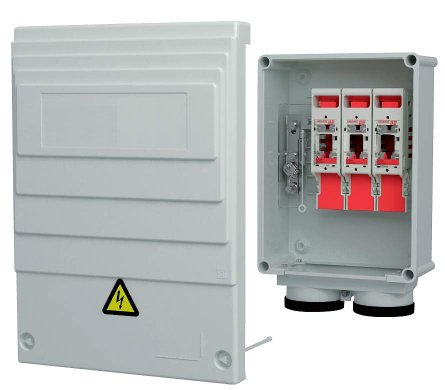 CGP tipo aerea